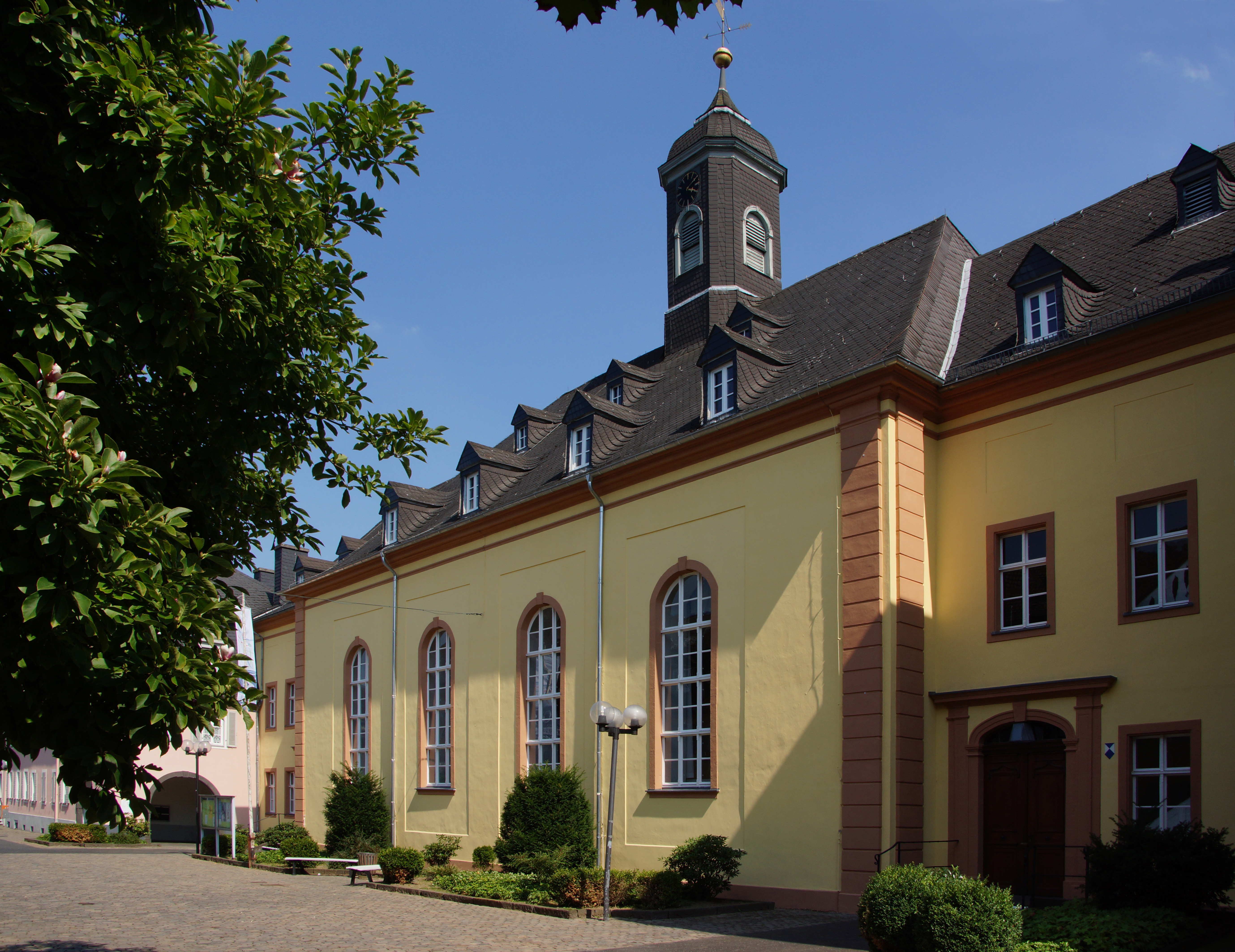 Kirche der evangelischen Brüdergemeinde in Neuwied, Friedrichstraße, erbaut 1783-85 im "Herrnhuter Stil" (Spätbarock)